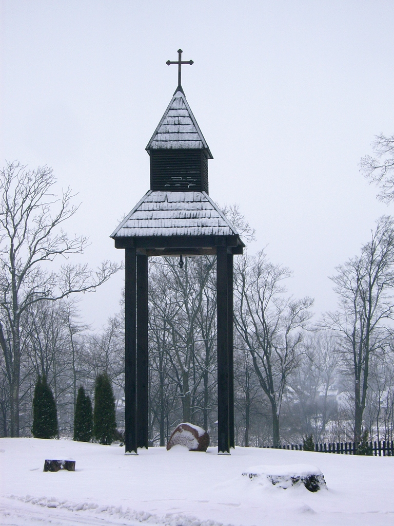 Paminklas pirmajai evangelikų bažnyčiai Tauragėje